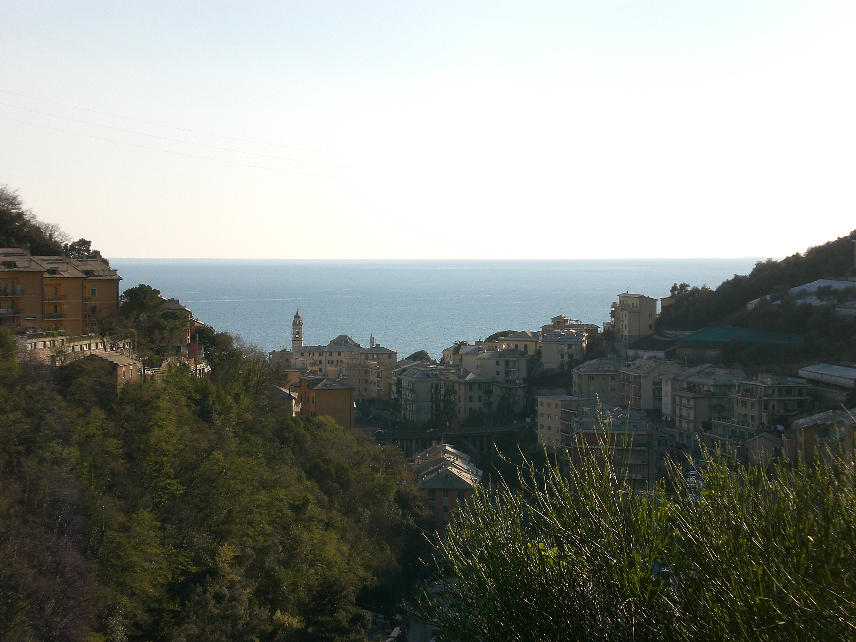 Bogliasco, Provincia di Genova, Italia